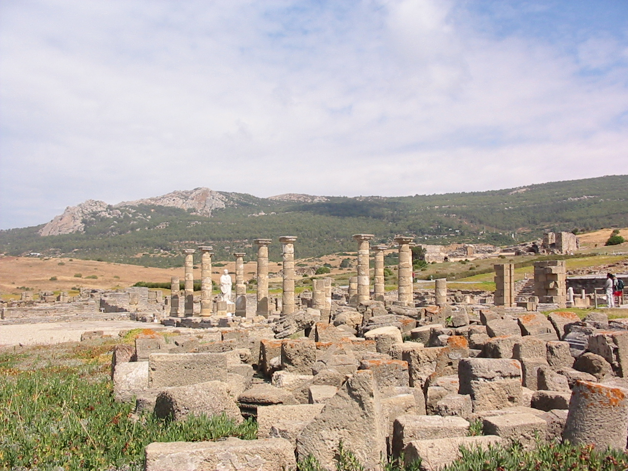 Conjunto Arqueológico de Baelo Claudia, Cádiz (Spain)